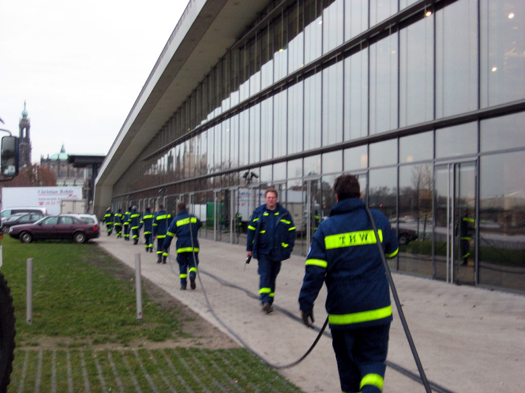 Helfer der Fachgruppe Elektroversorgung der Bundesanstalt Technisches Hilfswerk (THW)